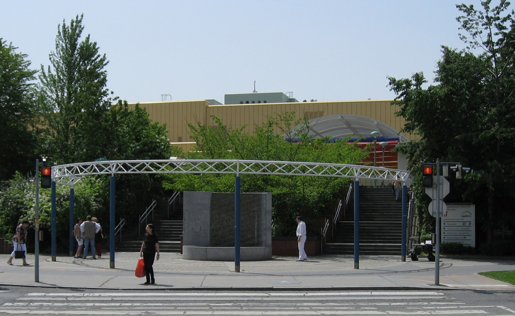 Wien SMZ Ost